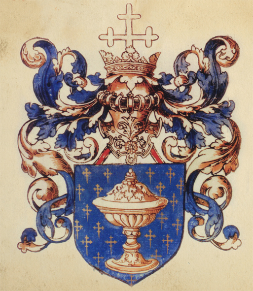 Escudo do reino de Galicia ilustrado no L´armorial Le Blancq. Bibliothèque nationale de Francegl:Categoría:Imaxes de escudos de Galicia